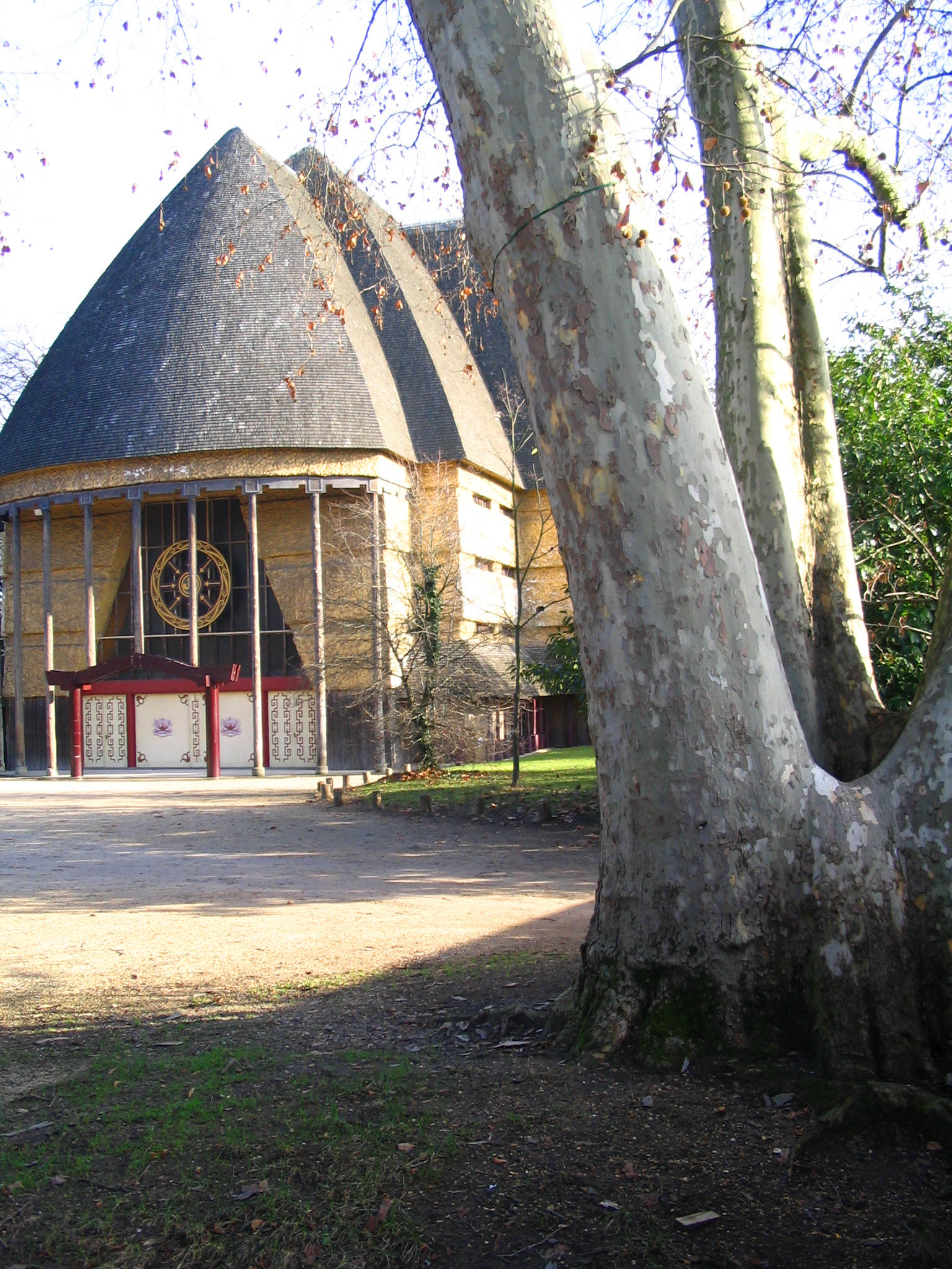 Pagode du Lac Daumesnil - Bois de Vincennes - France